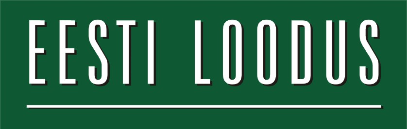 Eesti Looduse logo